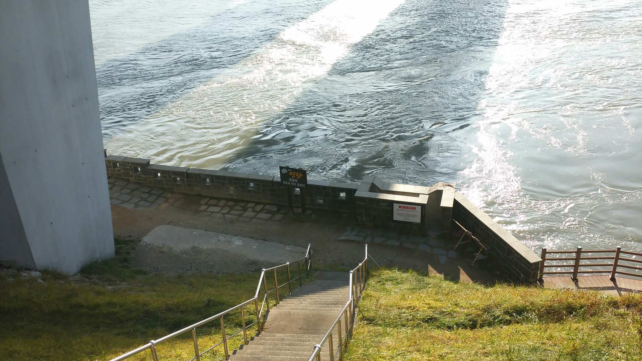 울돌목의 물살이 회오리 모양을 하고 있다.